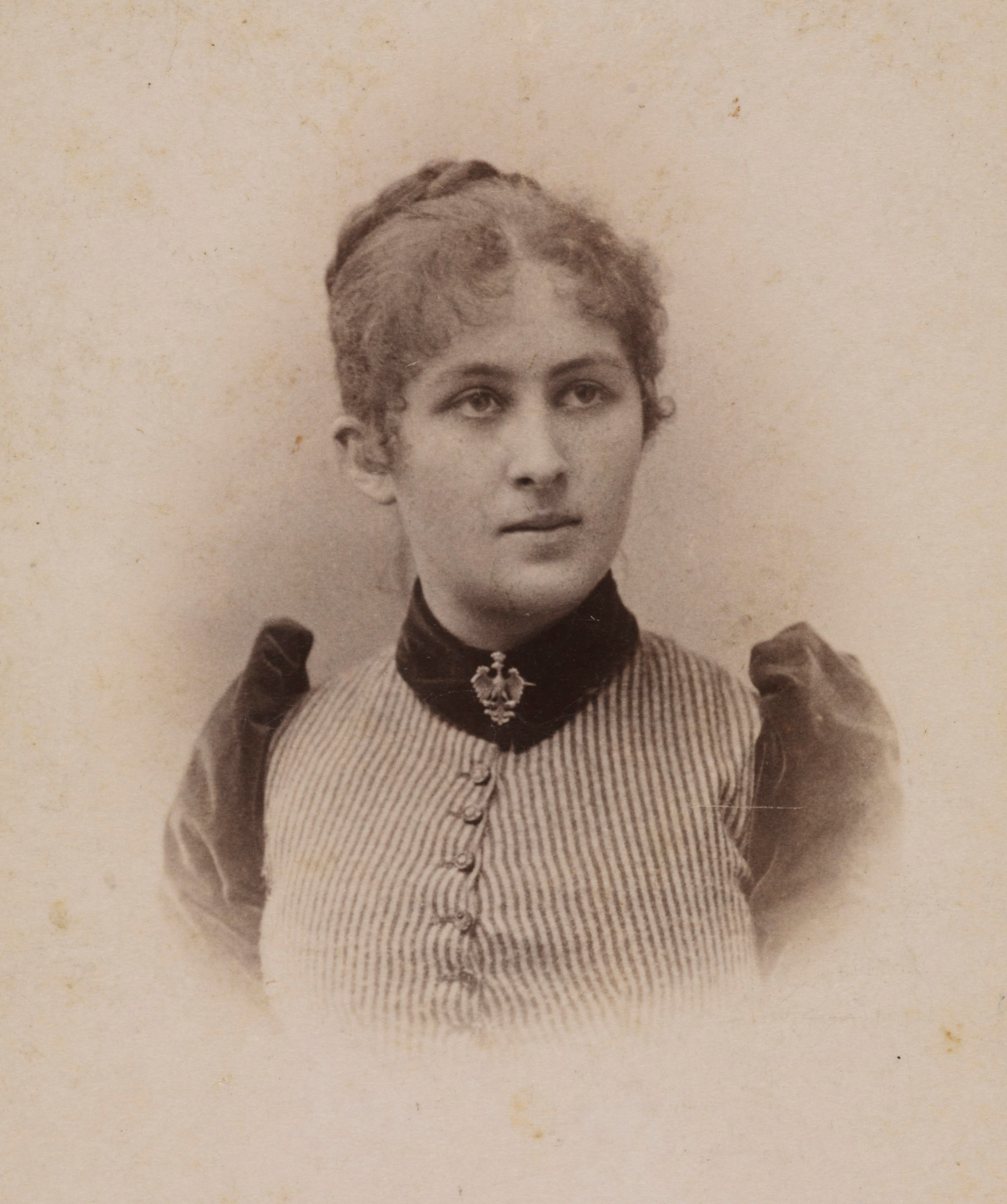 Maryla Wolska, ok. 1895 r.